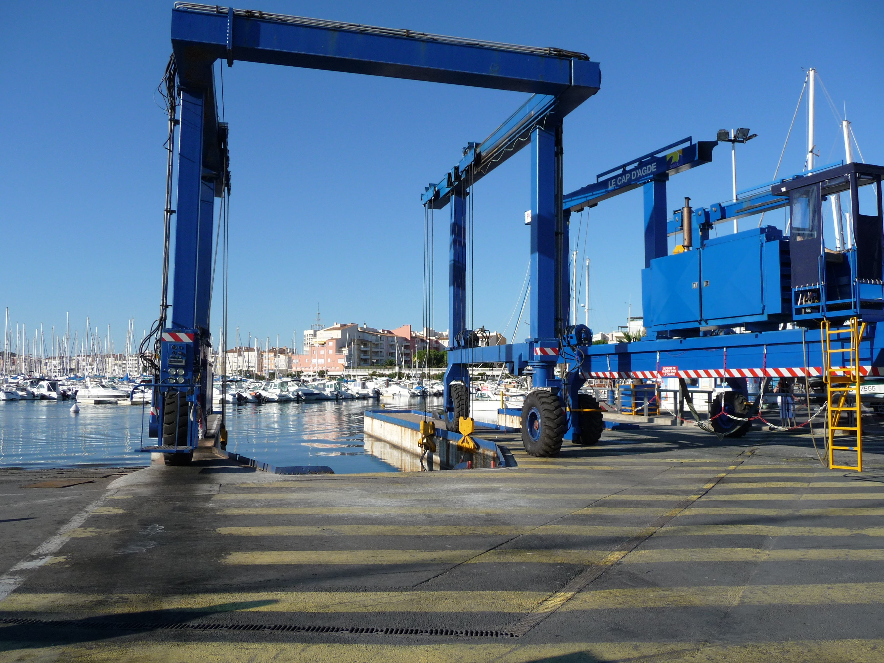 Portiques de manutention dans la zone technique du port de plaisance du Cap-d'Agde (Hérault, France)